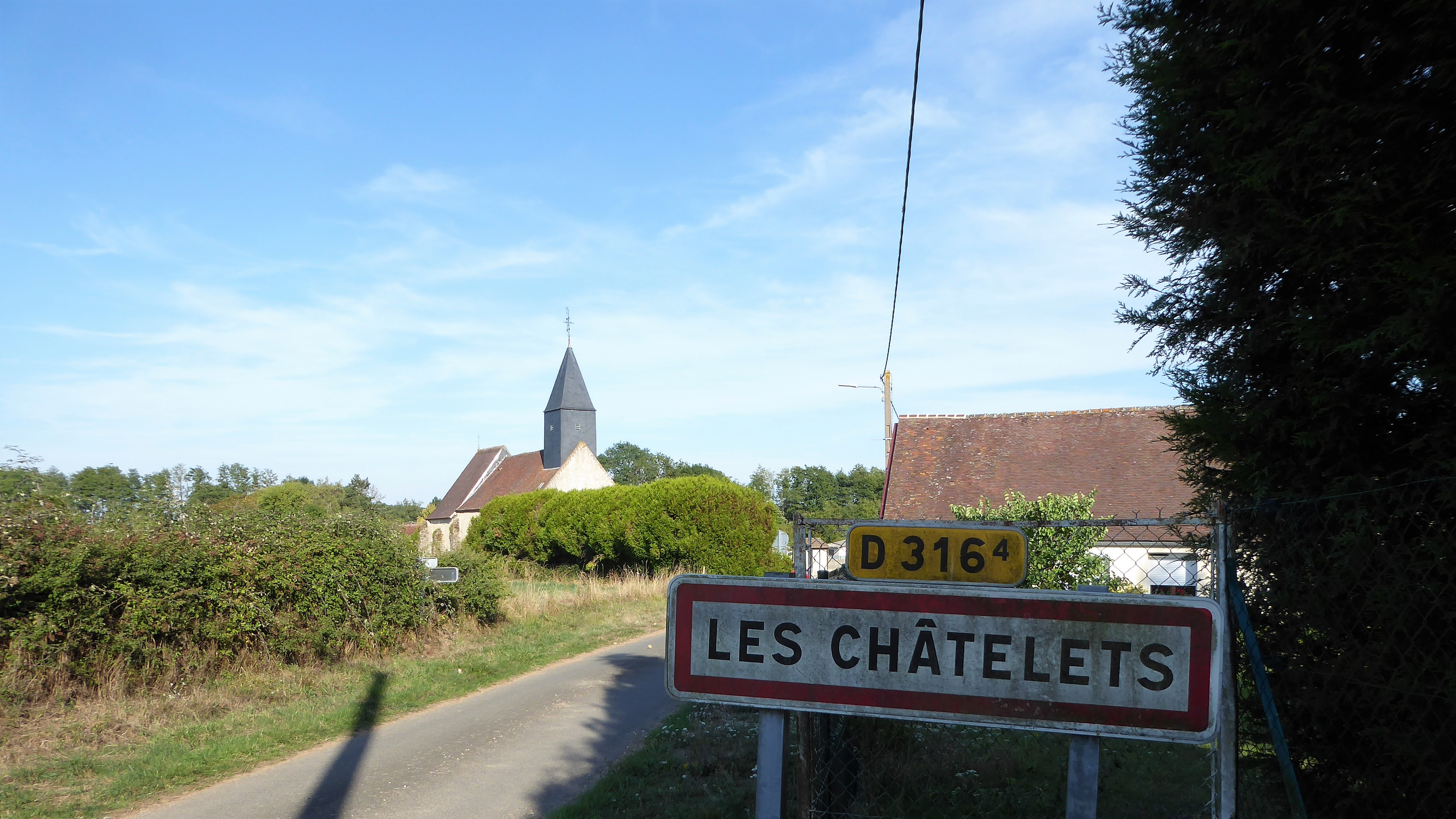 église Saint-Pierre des Châtelets, Eure-et-Loir, France.